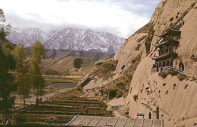 Teil der Mati-Si-Grotten im Süden des Kreises Sunan (Gansu)